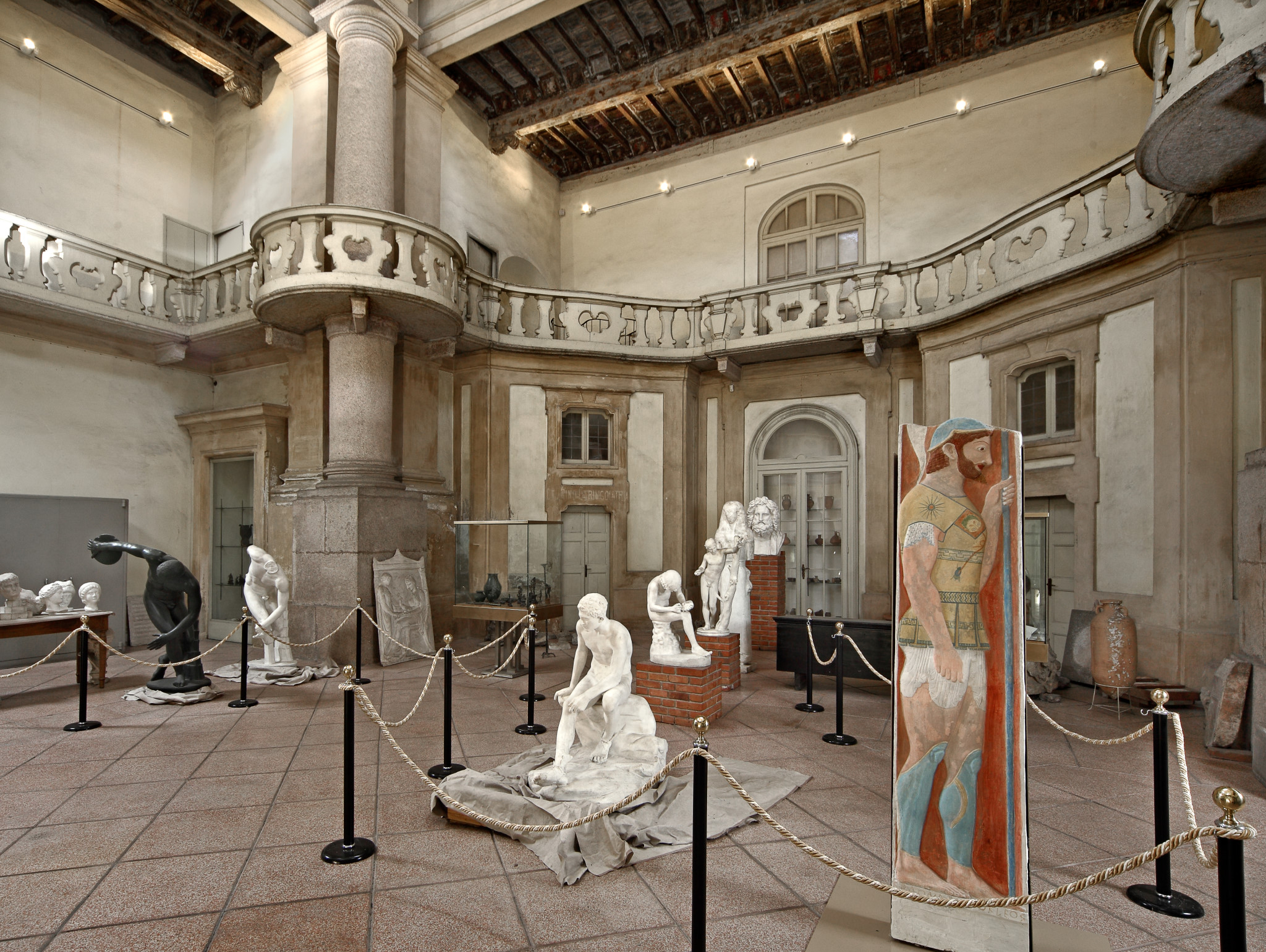 Raccolta del museo archeologico fondata nel 1819 da Pietro Vittorio Aldini